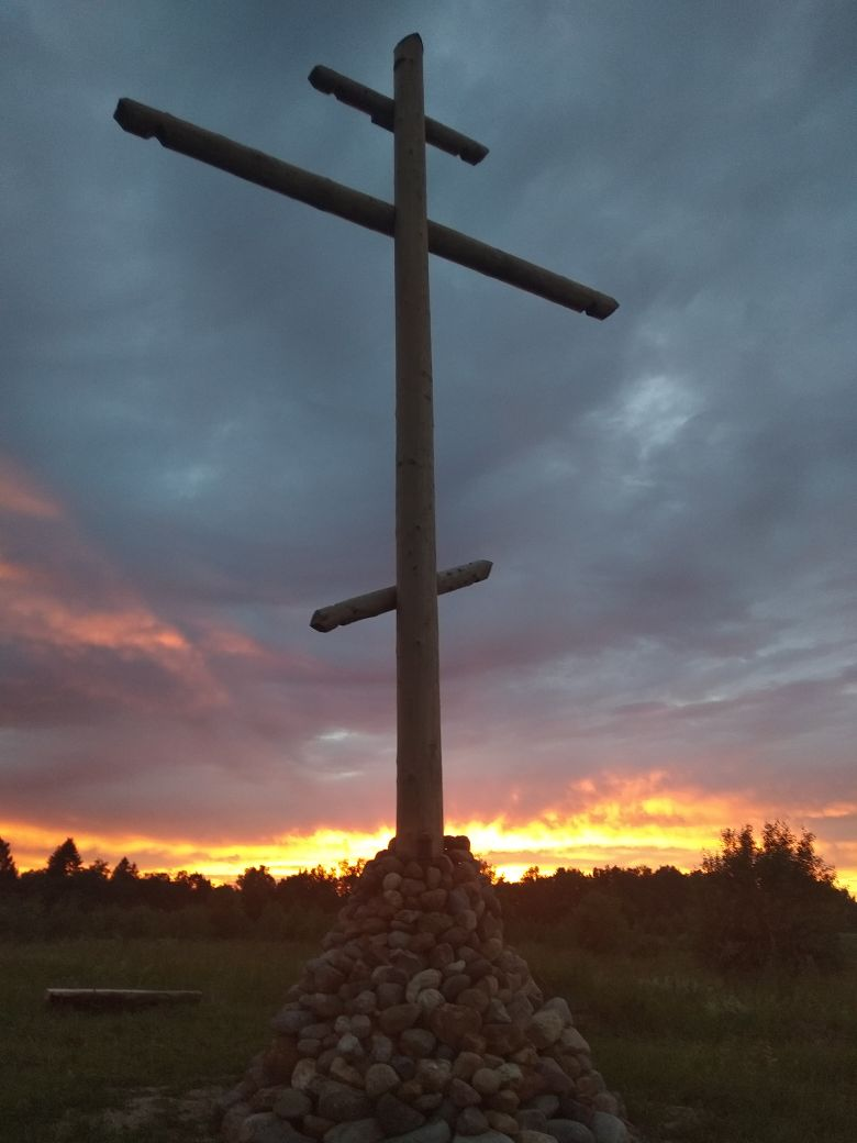 Крест на закате в окрестностях деревни Святогорово